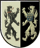 Wapen van Heeswijk-Dinther